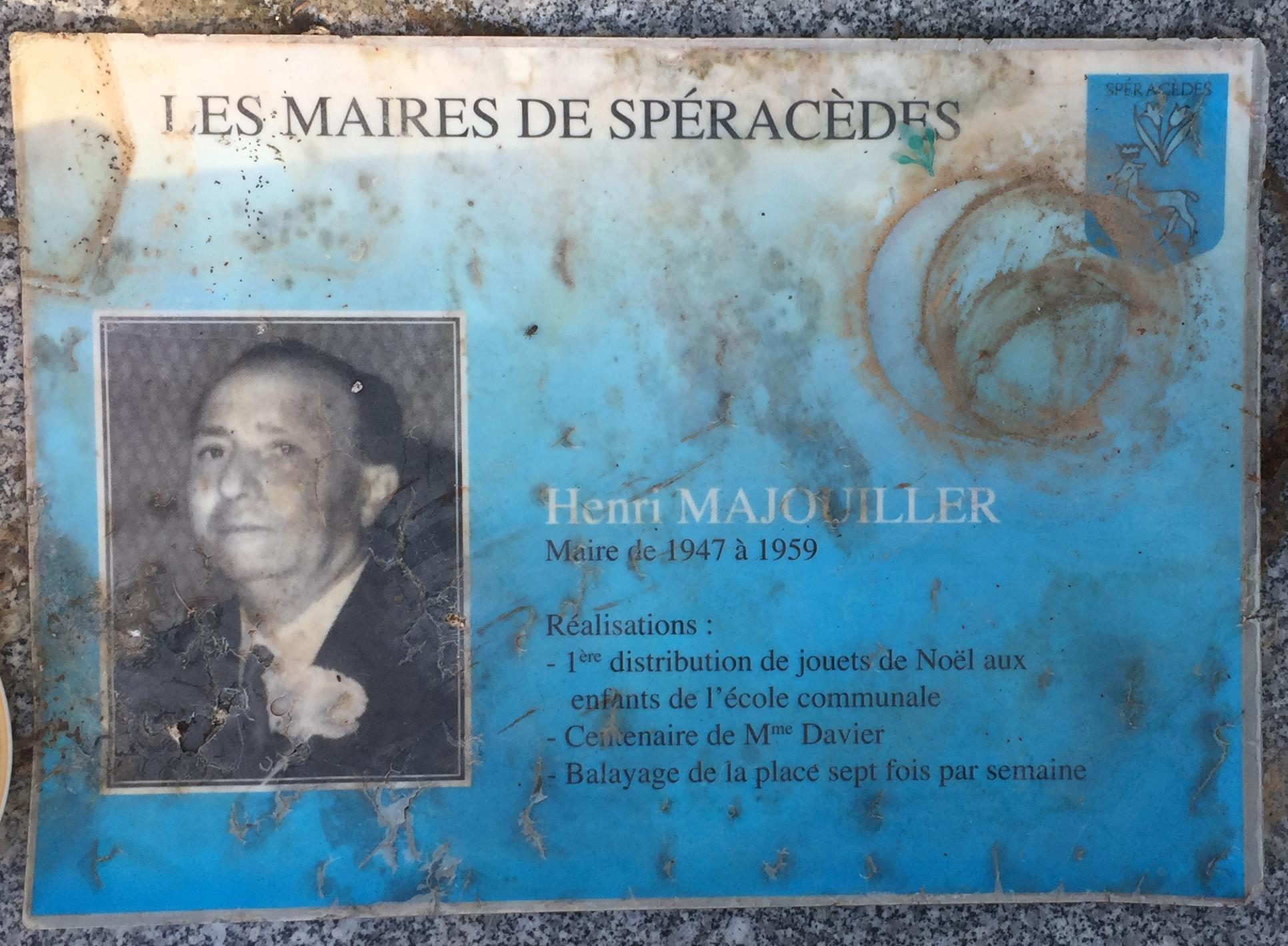 Henri MAJOUILLER Maire de SPERACEDES de 1947 à 1959 - Principales réalisations